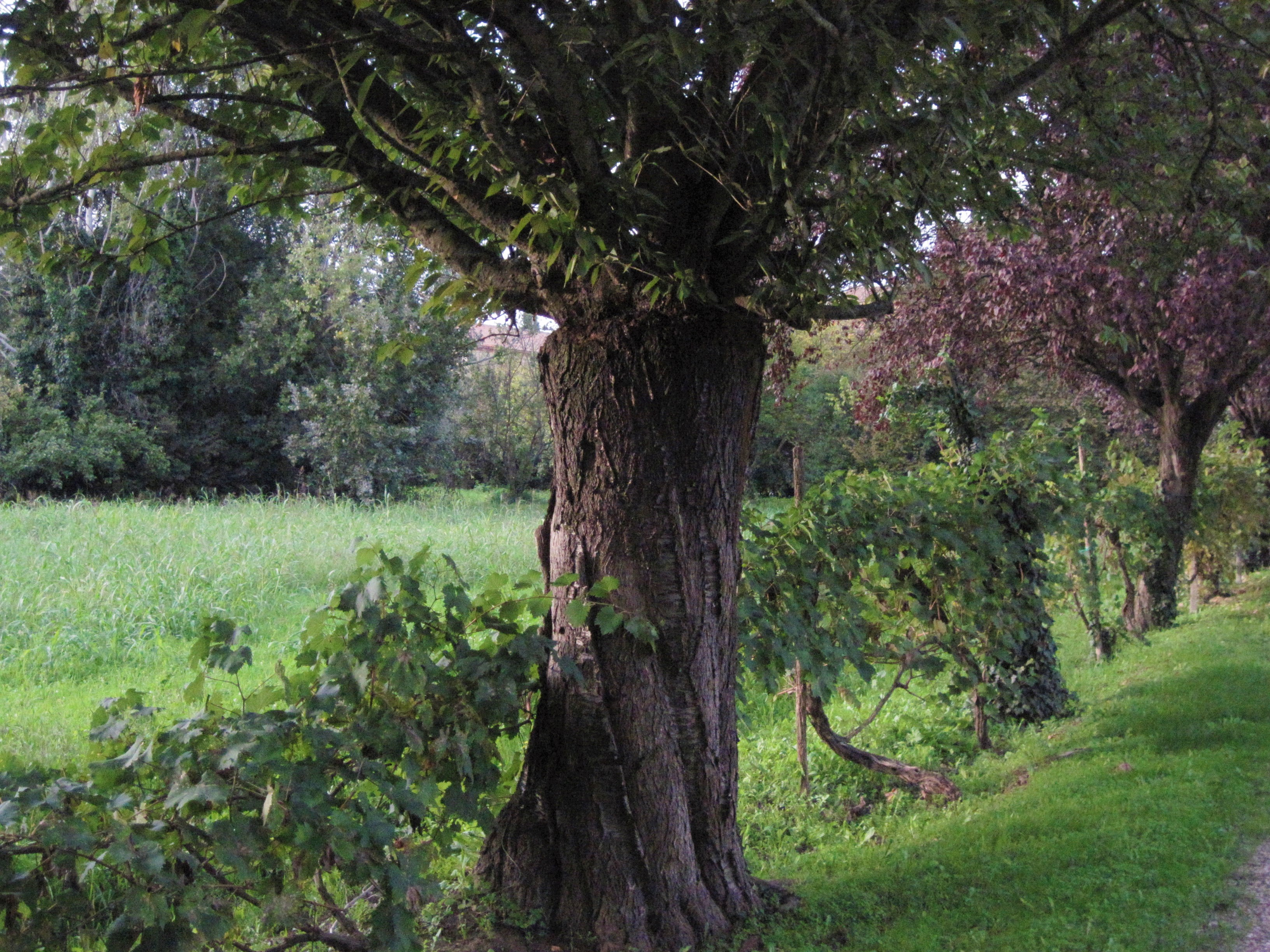 Via delle Vigne, a Ferrara, percorre l'ultima area urbana ancora non pienamente utlizzata per la costruzione di edifici. Si trova nel settore nord est della città, e divide idealmente la Certosa cattolica dal Cimitero ebraico in uno spazio pieno di verde e di residue attivitò agricole entro le mura.